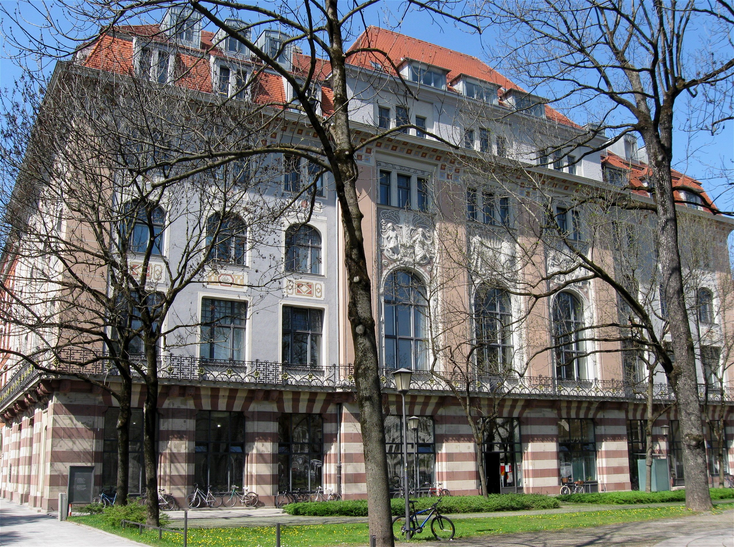 Maximiliansplatz 8; Ehem. Haus für Handel und Gewerbe und Börse, jetzt Industrie- und Handelskammer, dreiseitig freistehender, reich gestalteter Bau in frei historisierenden Formen mit polychromer Fassade, 1899-1901 von Friedrich Thiersch; erhaltene Innenräume, u.a.: Treppe mit Relief von Ignatius Taschner, Haupttreppe, vertäfelter Sitzungssaal; bildet einen Block mit Max-Joseph-Straße 2